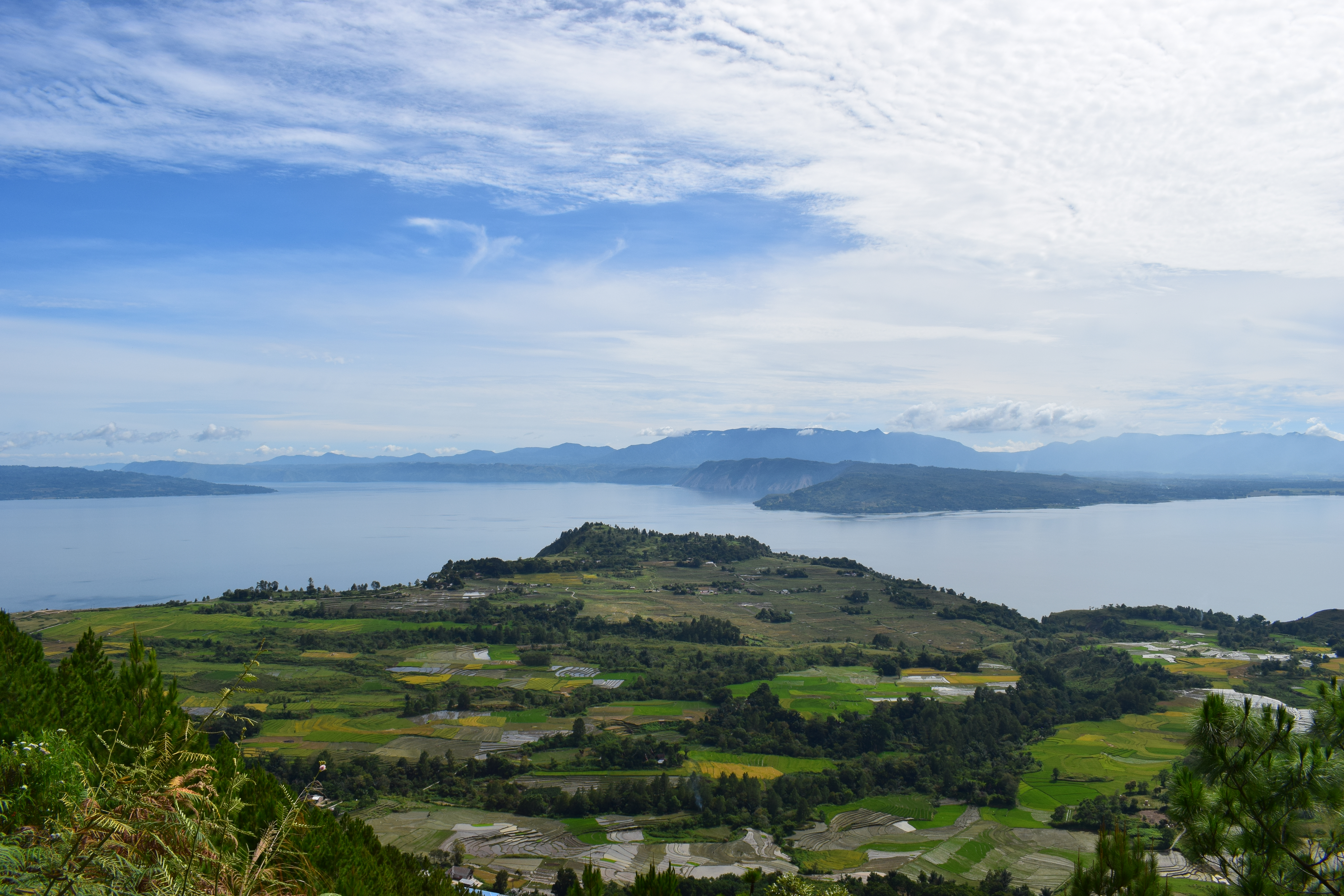 Danau Toba dilihat dari Dolok Tolong - Balige. Harminonisasi antara Langit, Danau, dan bentangan Sawah Hijau